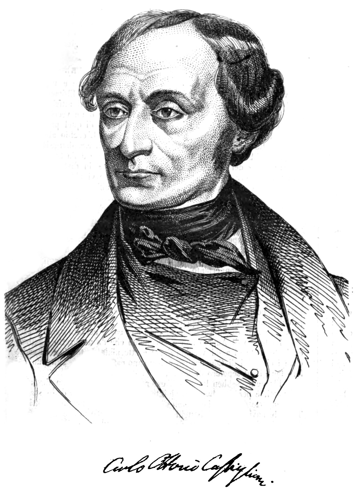 Carlo Ottavio Castiglioni